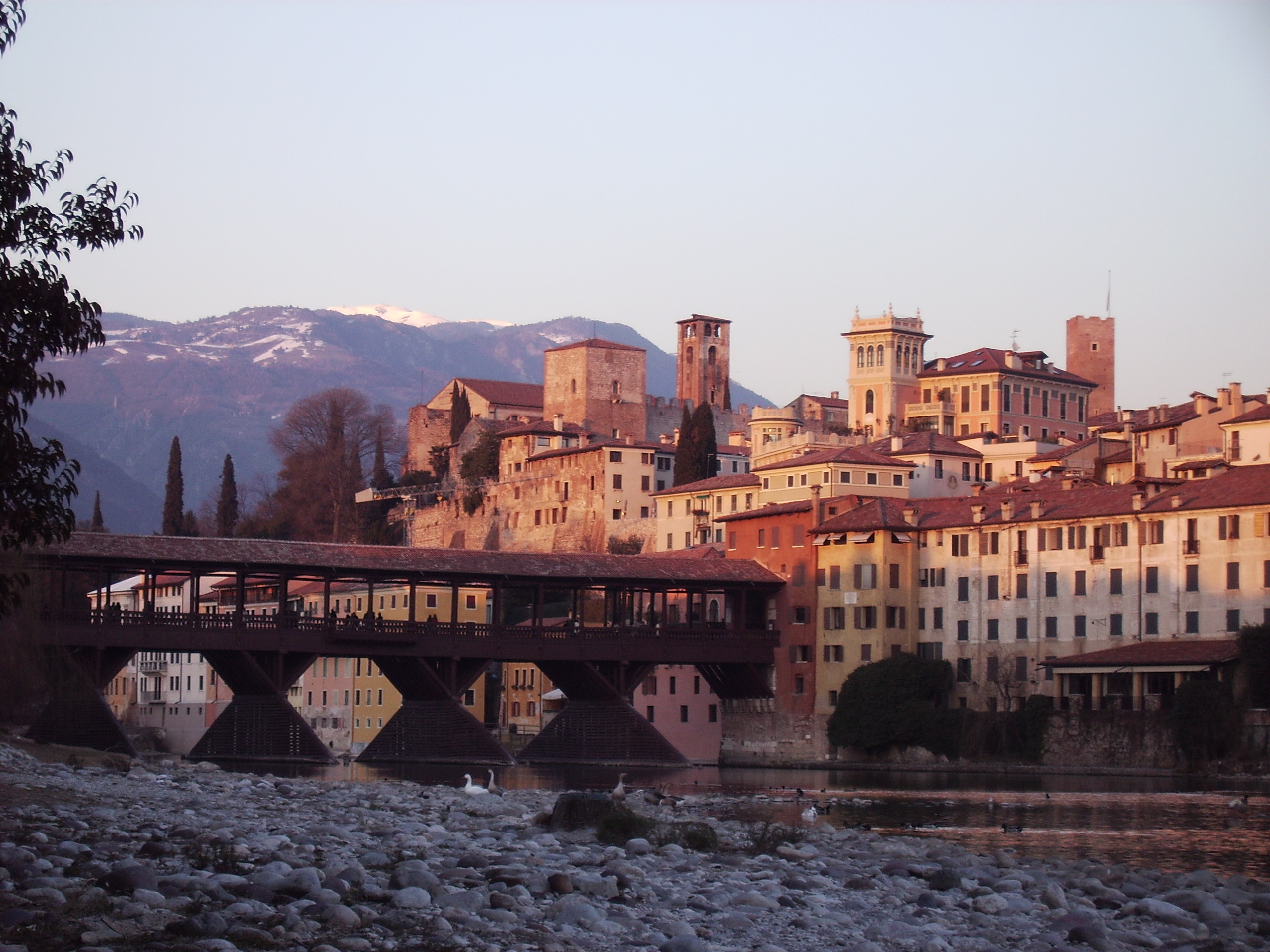 Bassano del Grappa (Vicenza, Italy)